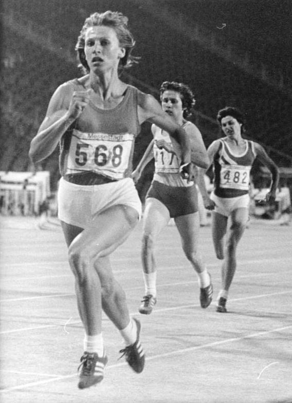 Anita Weiß, Martina Kämpfert, Hildegard Ullrich ADN-ZB Kluge 02.07.78 Leipzig: 29. DDR-Meisterschaften der Leichtathletik- Überlegen sicherte sich die 22jährige Anita Weiß (SC Neubrandenburg-vorn) im 800-m-Lauf (Siegerzeit 1:58,8 min) am 1.7. ihren zweiten Meisterschaftstitel. Am Vortag war sie bereits über 400 m Hürden erfolgreich. Im Hintergrund Martina Kämpfert (TSC Berlin-2.Fl.) und Hildegard Ullrich (SC Turbine Erfurt-3.Pl.-rechts im Bild) .